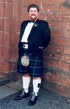 Inchture1999_4_17